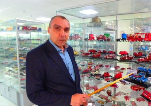 Музей